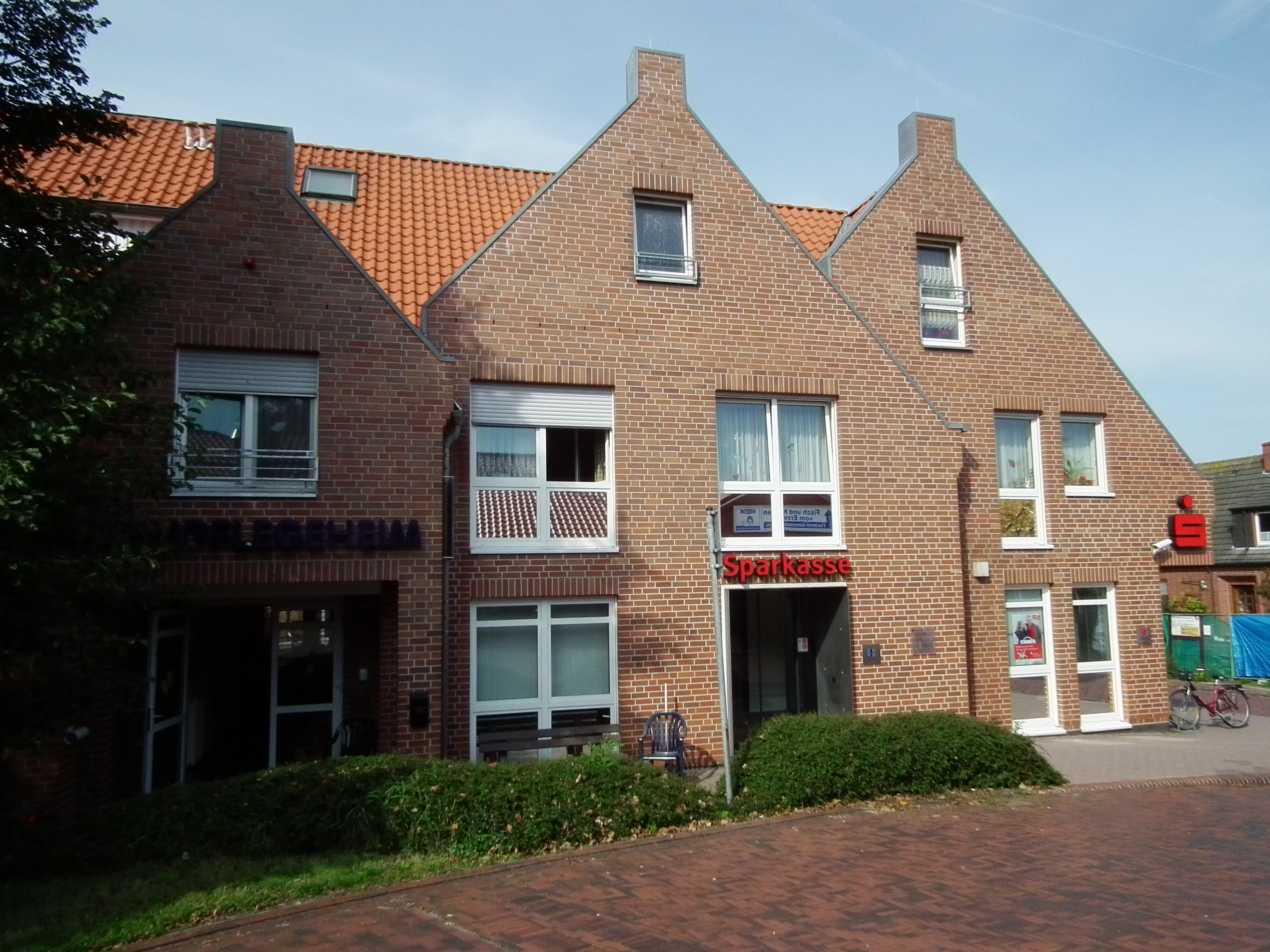 Sparkasse in Greetsiel (Niedersachsen, Deutschland)